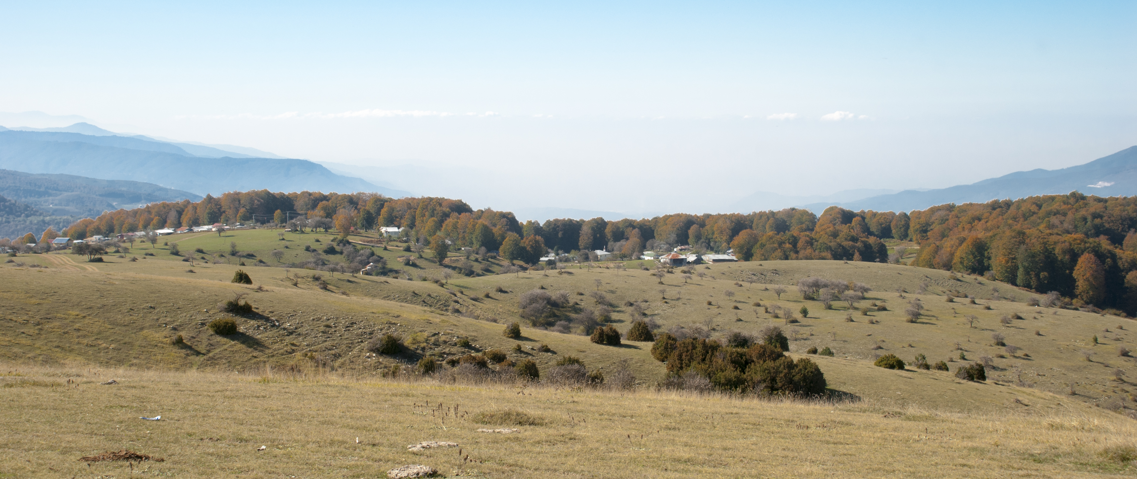 Sakarya, ili Akyazı ilçesi sınırlarında Davlumbaz Yaylası.